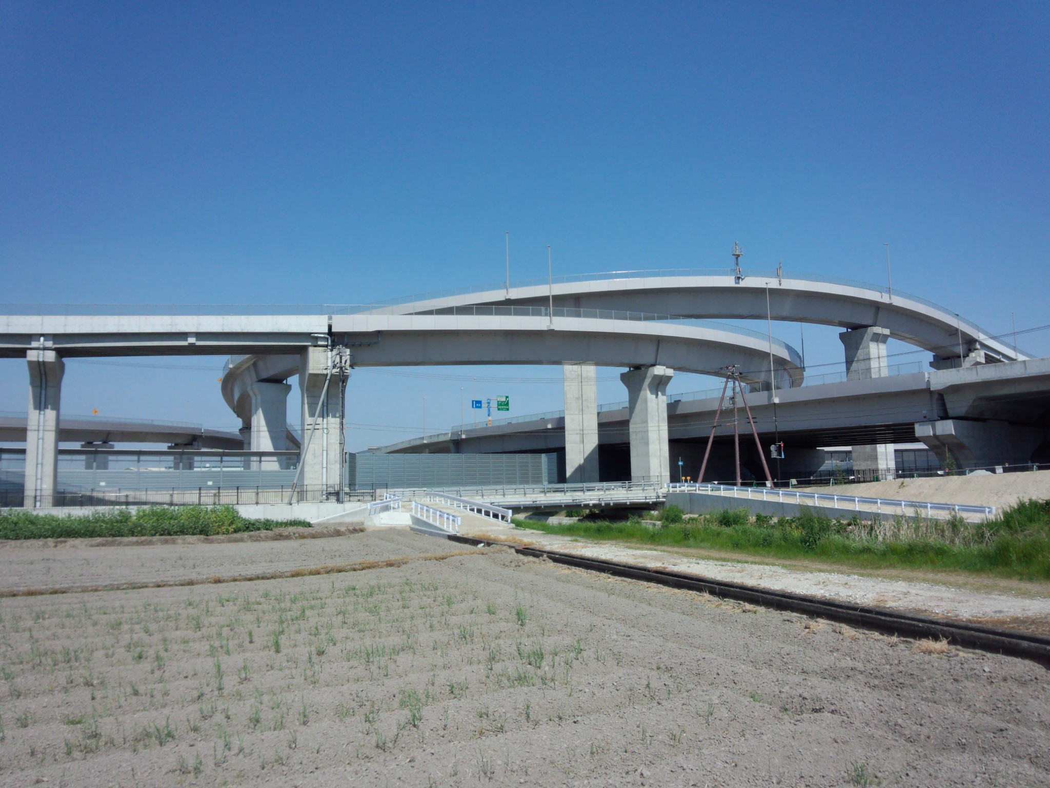 加古川中央ジャンクション